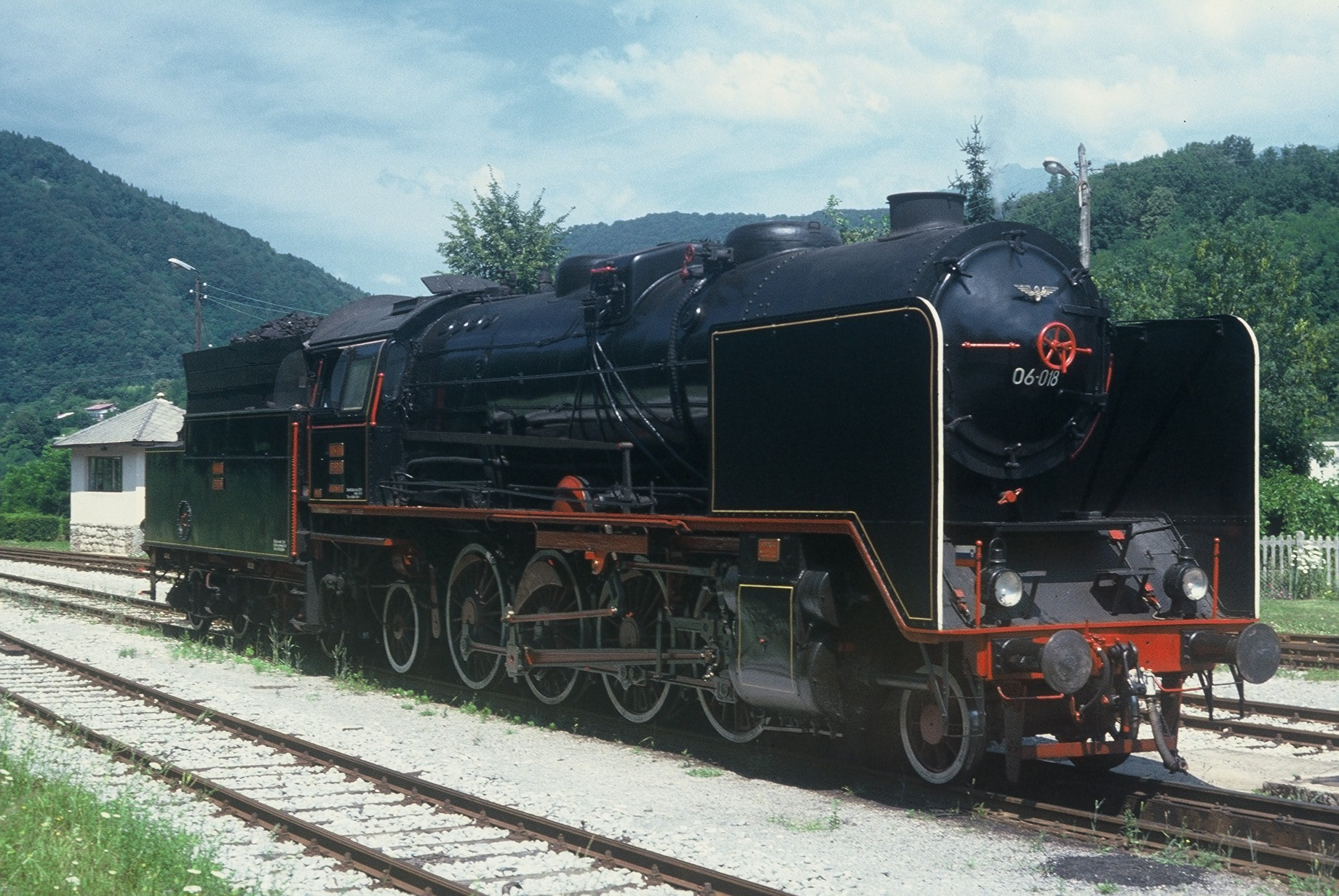 JŽ 06 na postaji Most na Soči